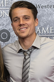 Seattle Sounders defender Marc Burch. Photos by